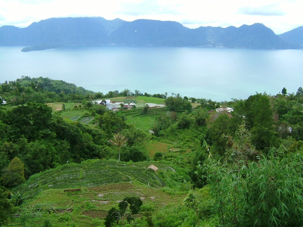 Lake Maninjau in West Sumatra, Indonesia